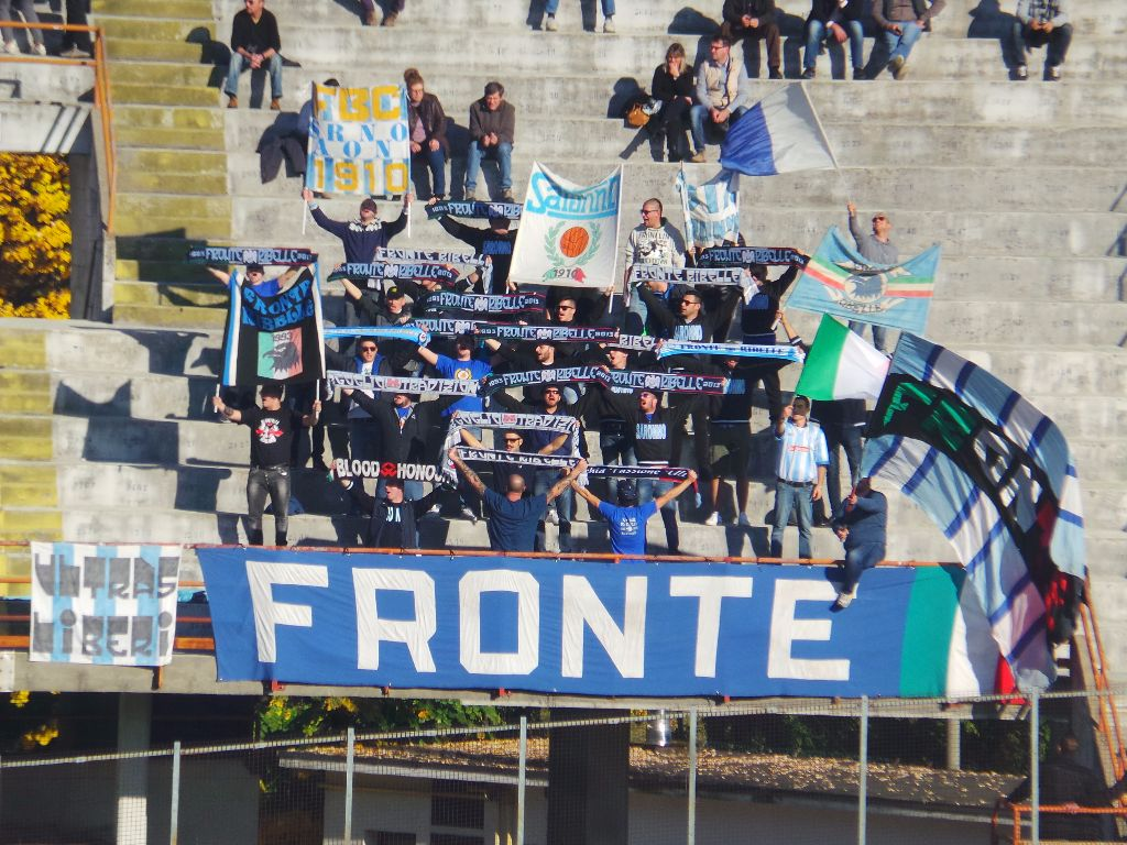 Gli ultras del Fronte Ribelle Saronno al seguito del FBC Saronno allo Stadio Franco Ossola di Varese in occasione di una gara del campionato di Eccellenza Lombardia 2015-2016